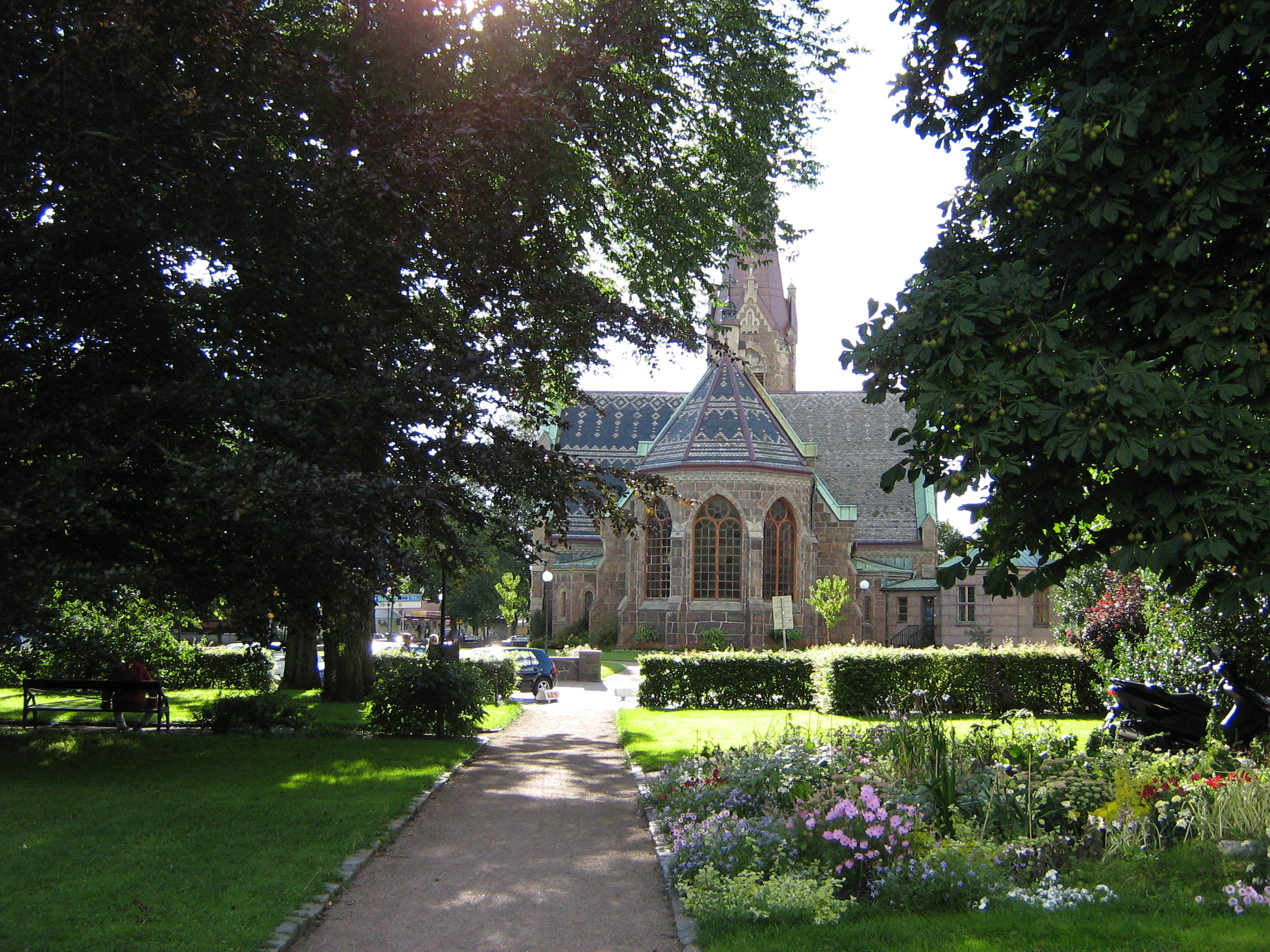 Falkenbergs kirke.